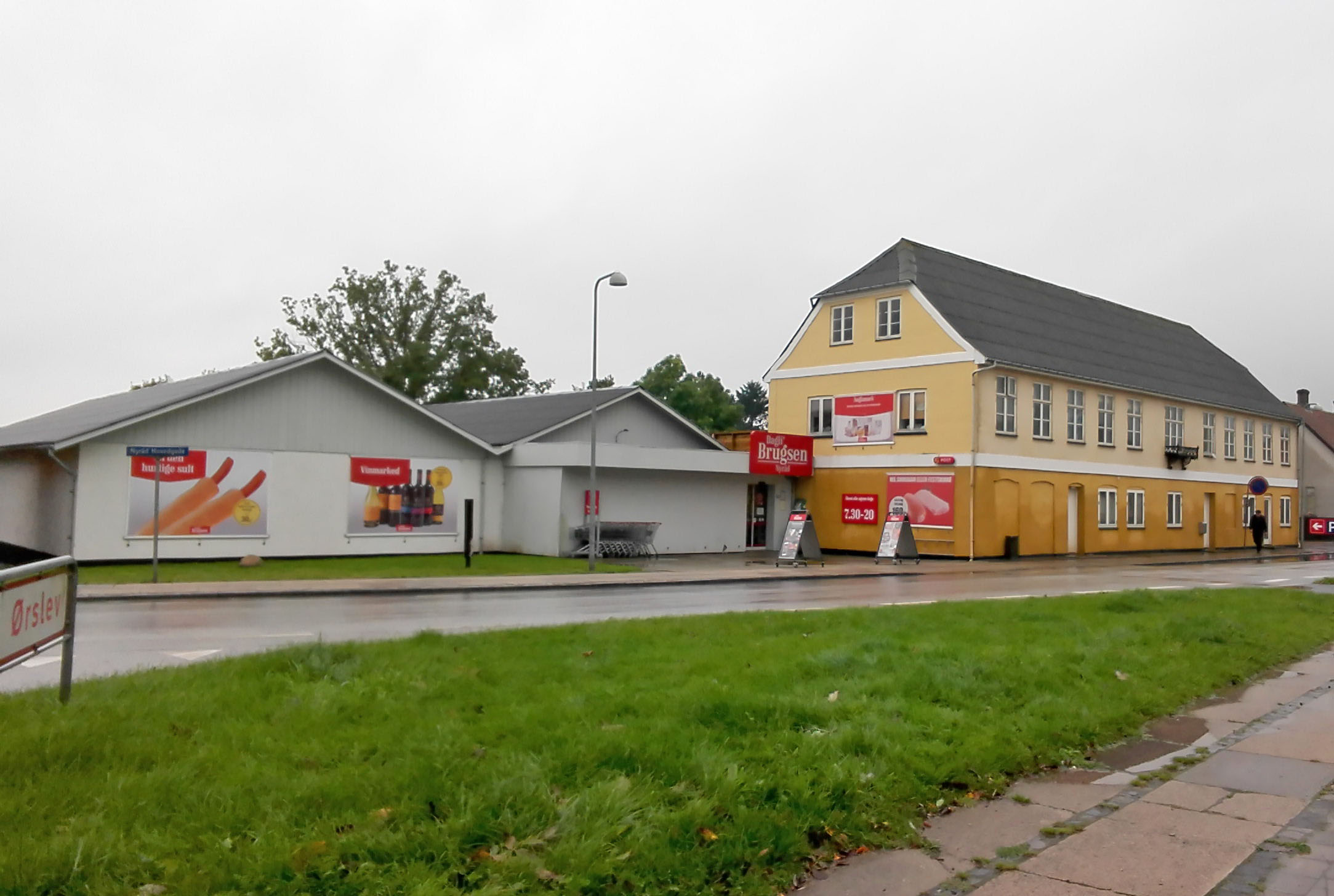 Brugsen i Nyråd